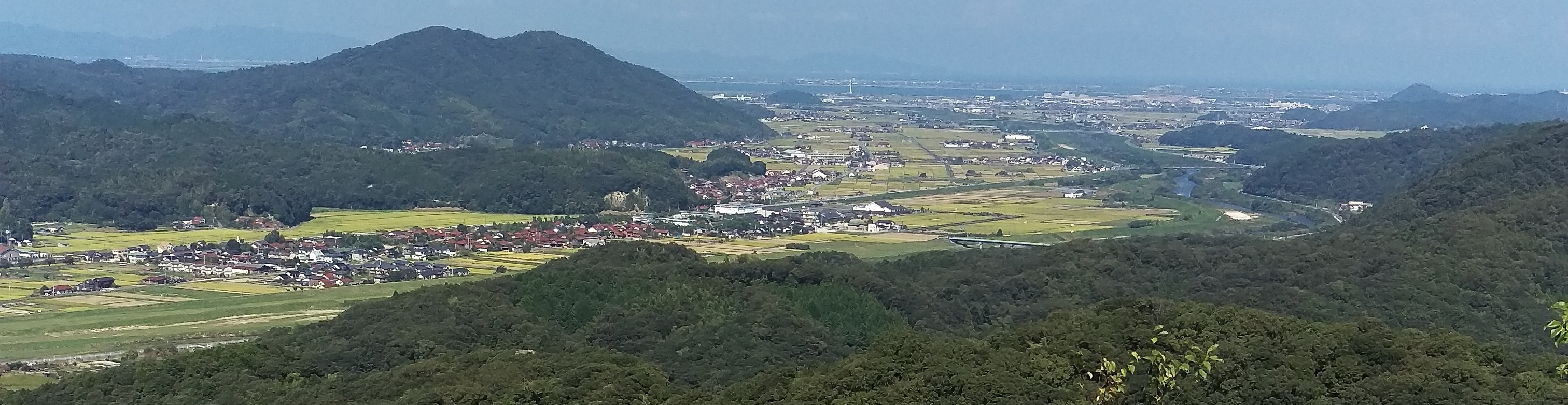 安来市遠景。月山富田城から。